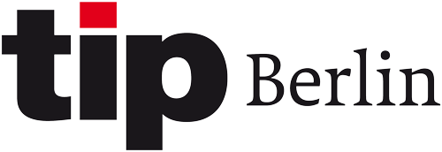 Tip Logo